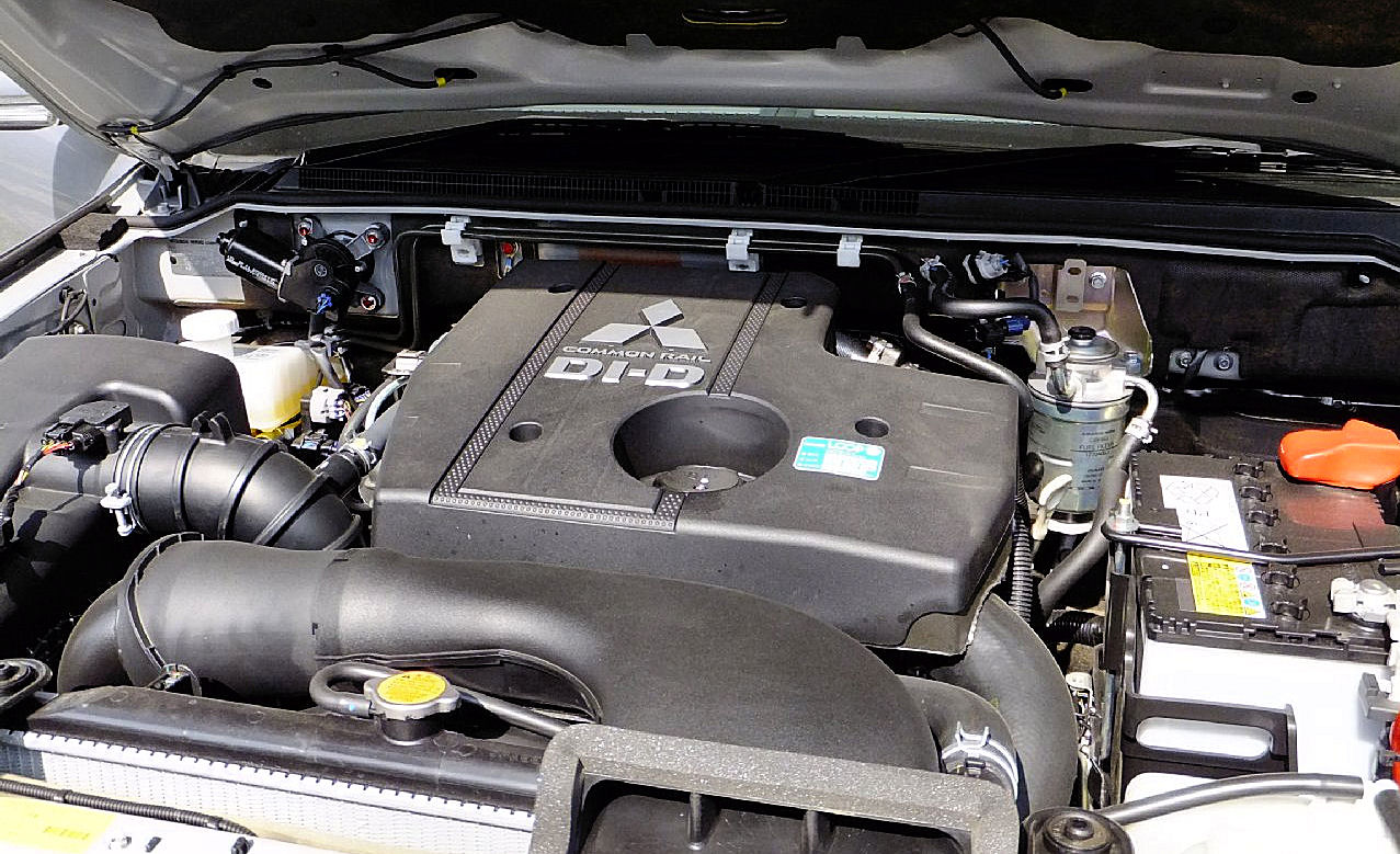 三菱 パジェロ ショートボディ VR-II 3200DID 2012年型